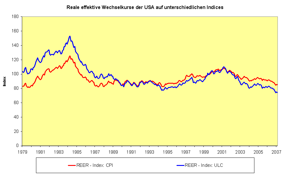 Reale effektive Wechselkurse der USA auf unterschiedlichen Indices